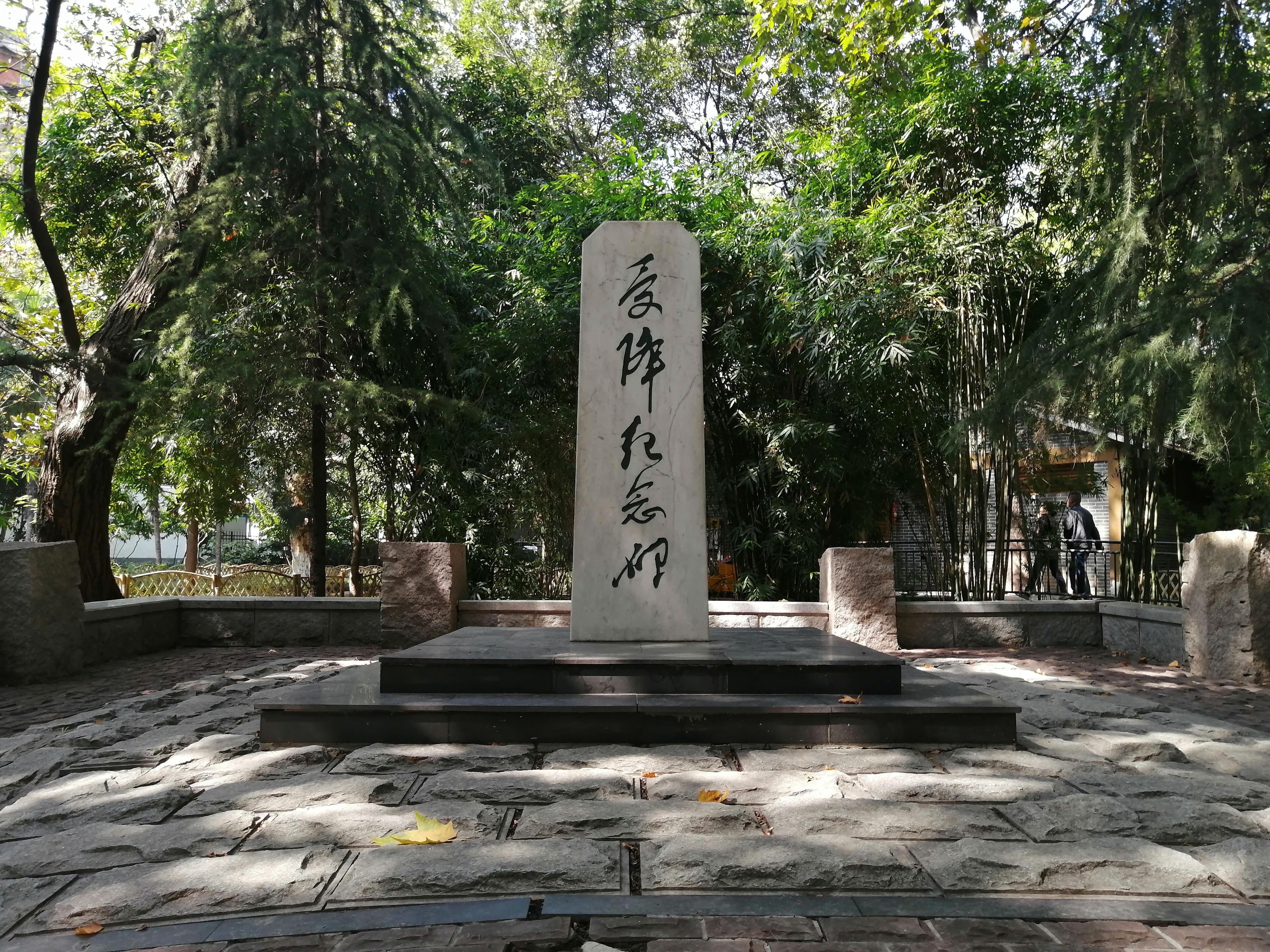 中文（中国大陆）: 武汉中山公园，国民政府第六战区受降堂旧址旁的受降纪念碑。